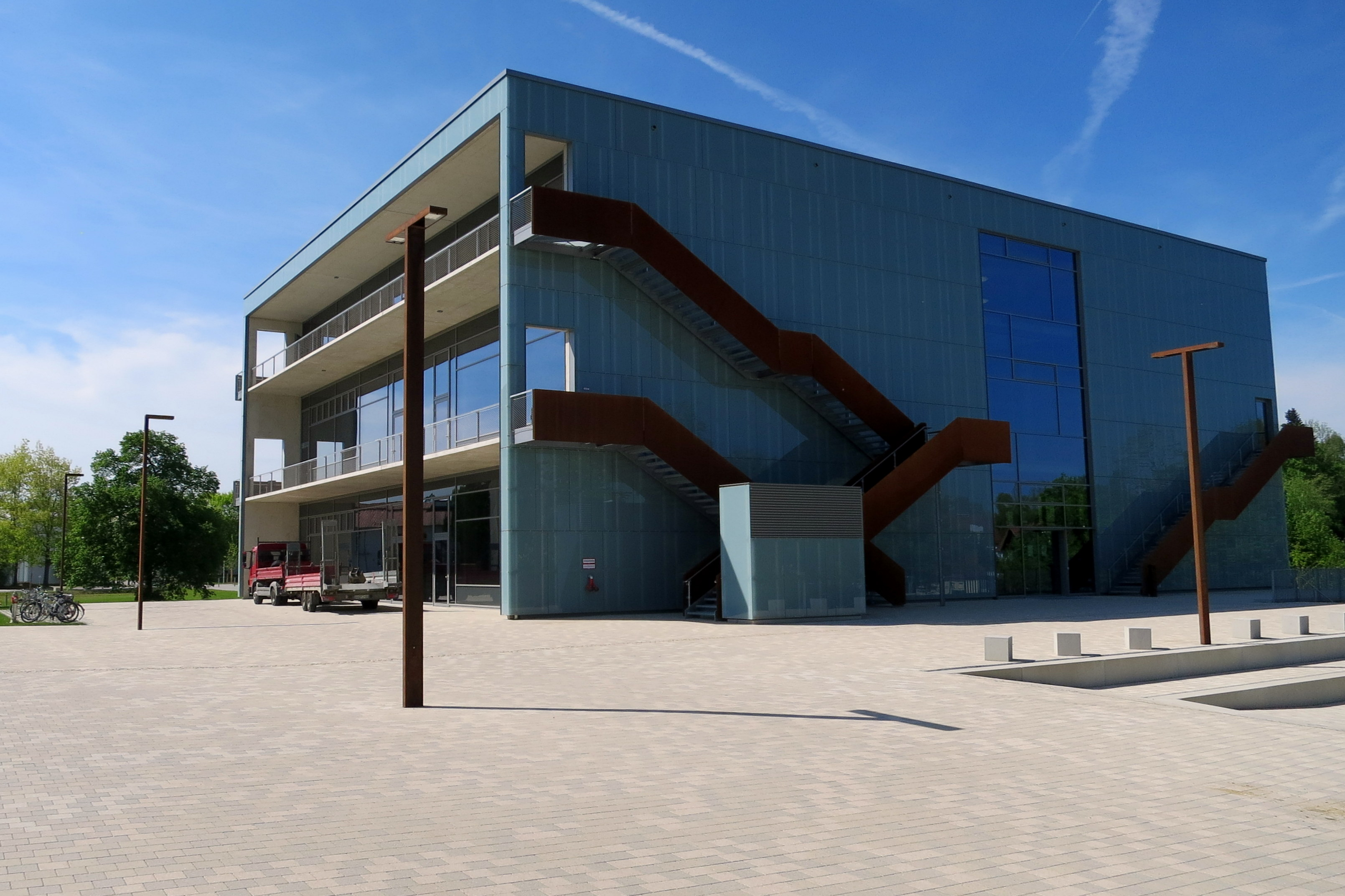 2018 fertiggestelltes Zentrum HSWT 02